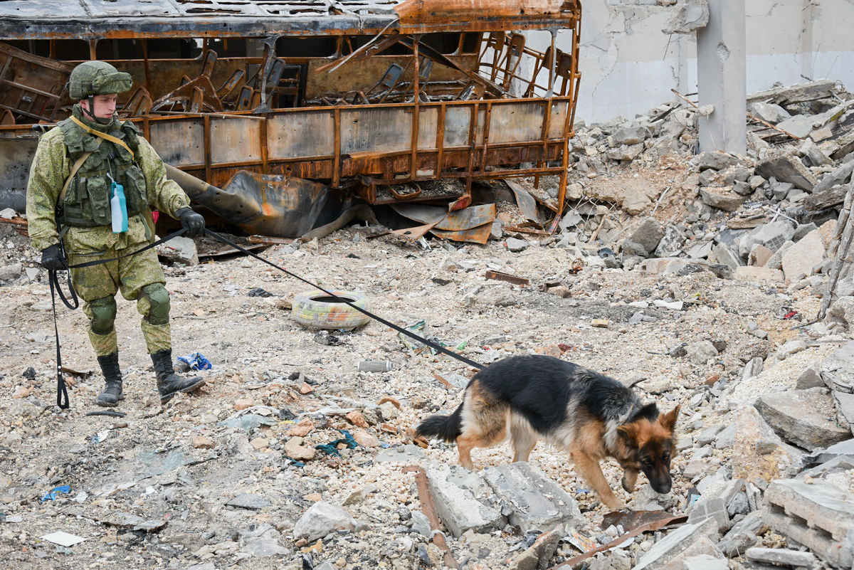 Работа сапёров Международного противоминного центра Министерства обороны России в Алеппо (Сирия)